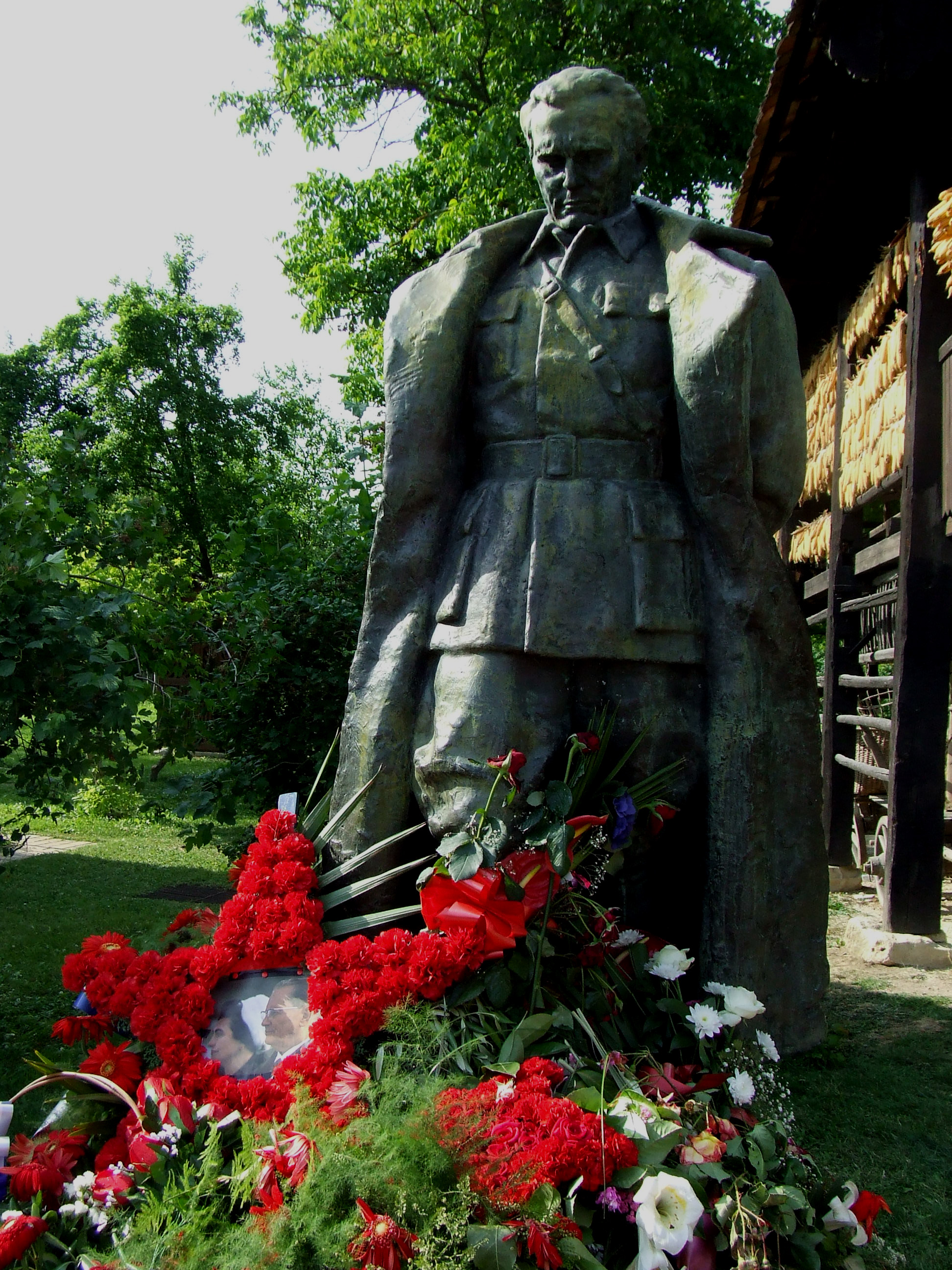 Titov spomenik poleg njegove rojstne hiše v Kumrovcu. Posneto 26.5.2007